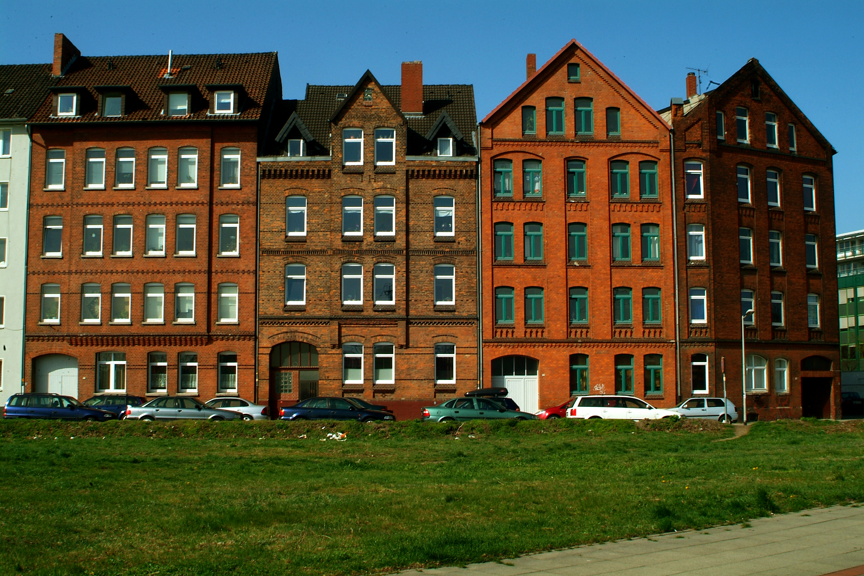 Sie haben ein besseres Bild? Sogar ein historisches Dokument als Bild(ungsförderung)? Zeigen Sie' s uns. Stiften Sie es doch auch - allen Menschen.